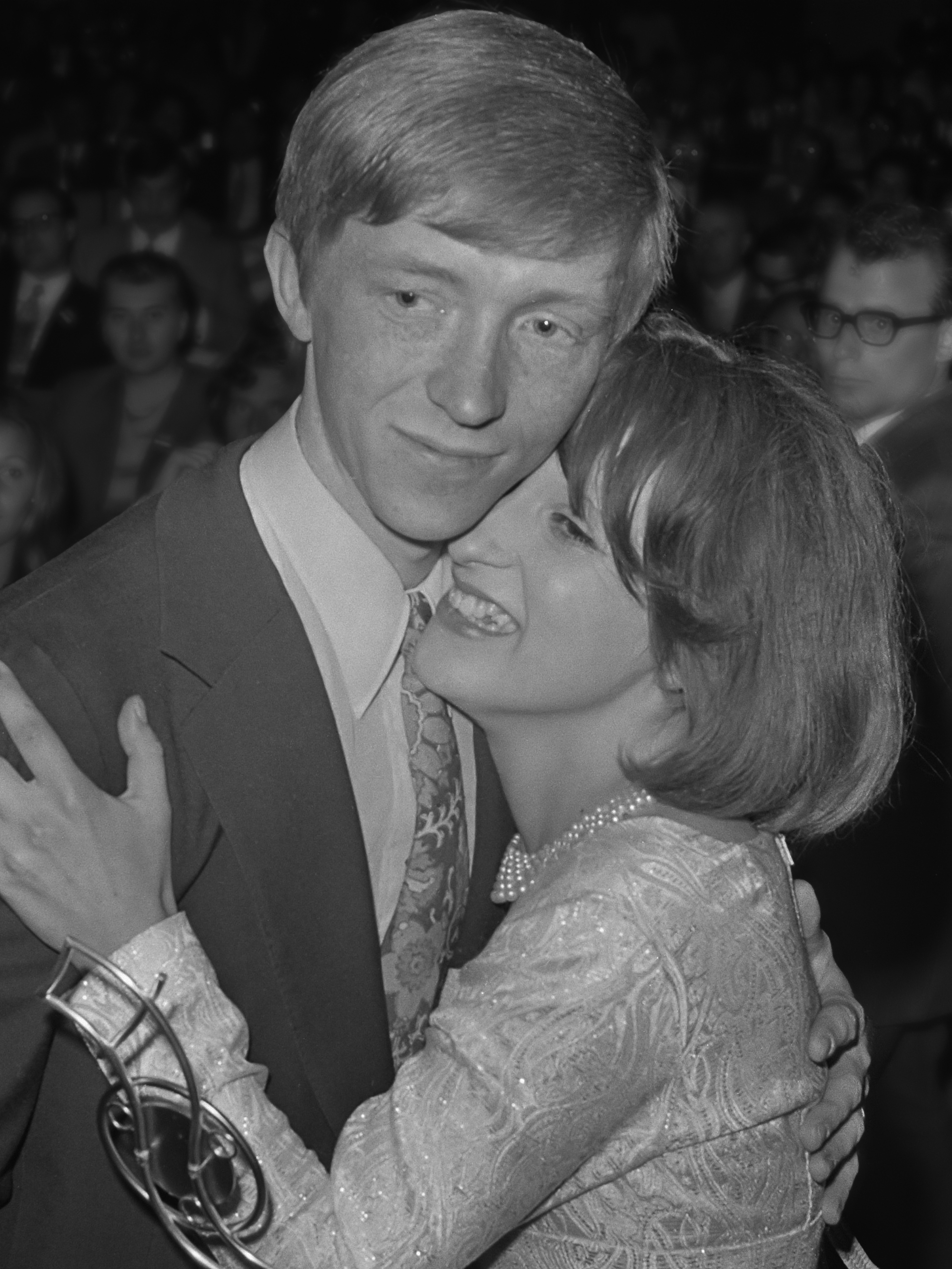 Internationale Goochelcongres in RAI, Amsterdam; Richard Ross (Nederland), wereldkampioen goochelen, wordt omhelsd door verloofde 12 juli 1970